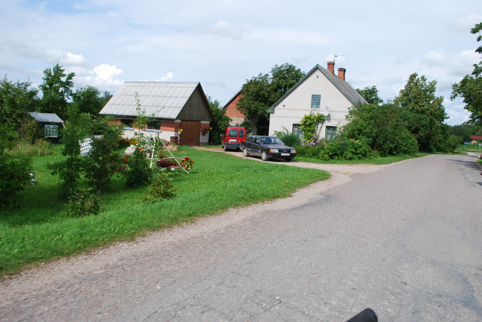 Kaive